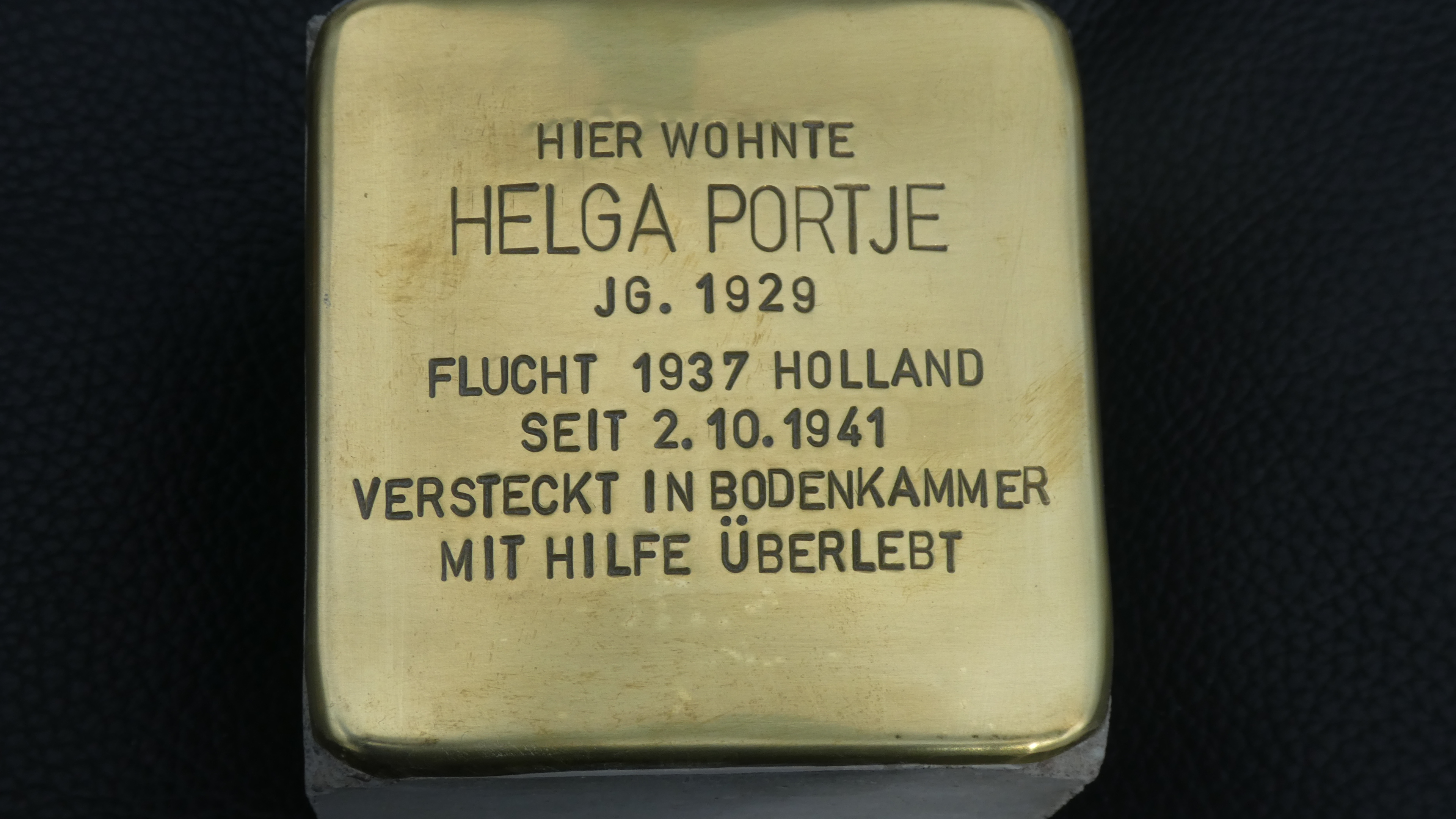 Helga Portje, 2018